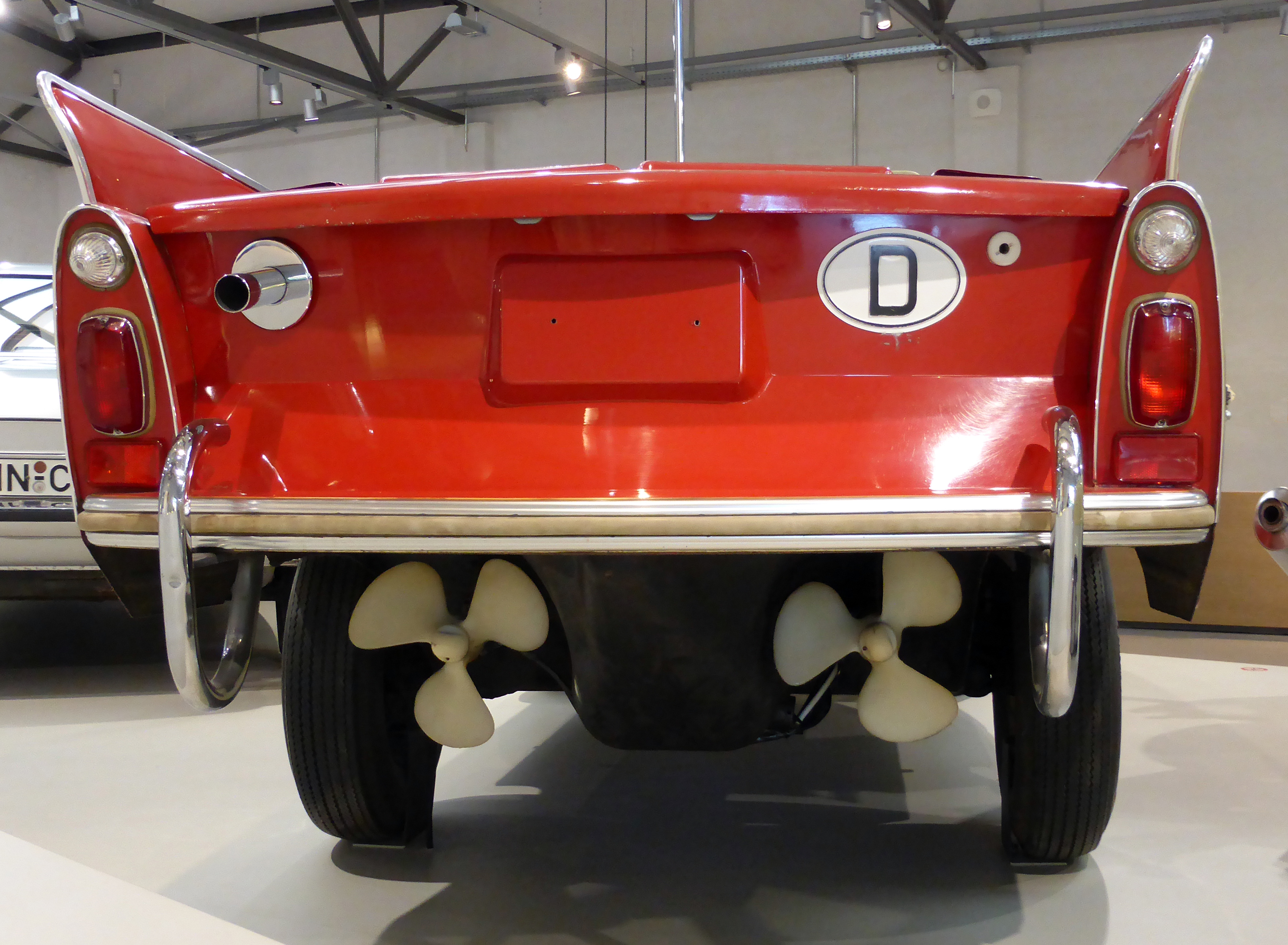 Amphicar im Deutschen Technikmuseum in Berlin. Wikipedianische KulTour am 10. Oktober 2015 in der Ausstellung des Museums.